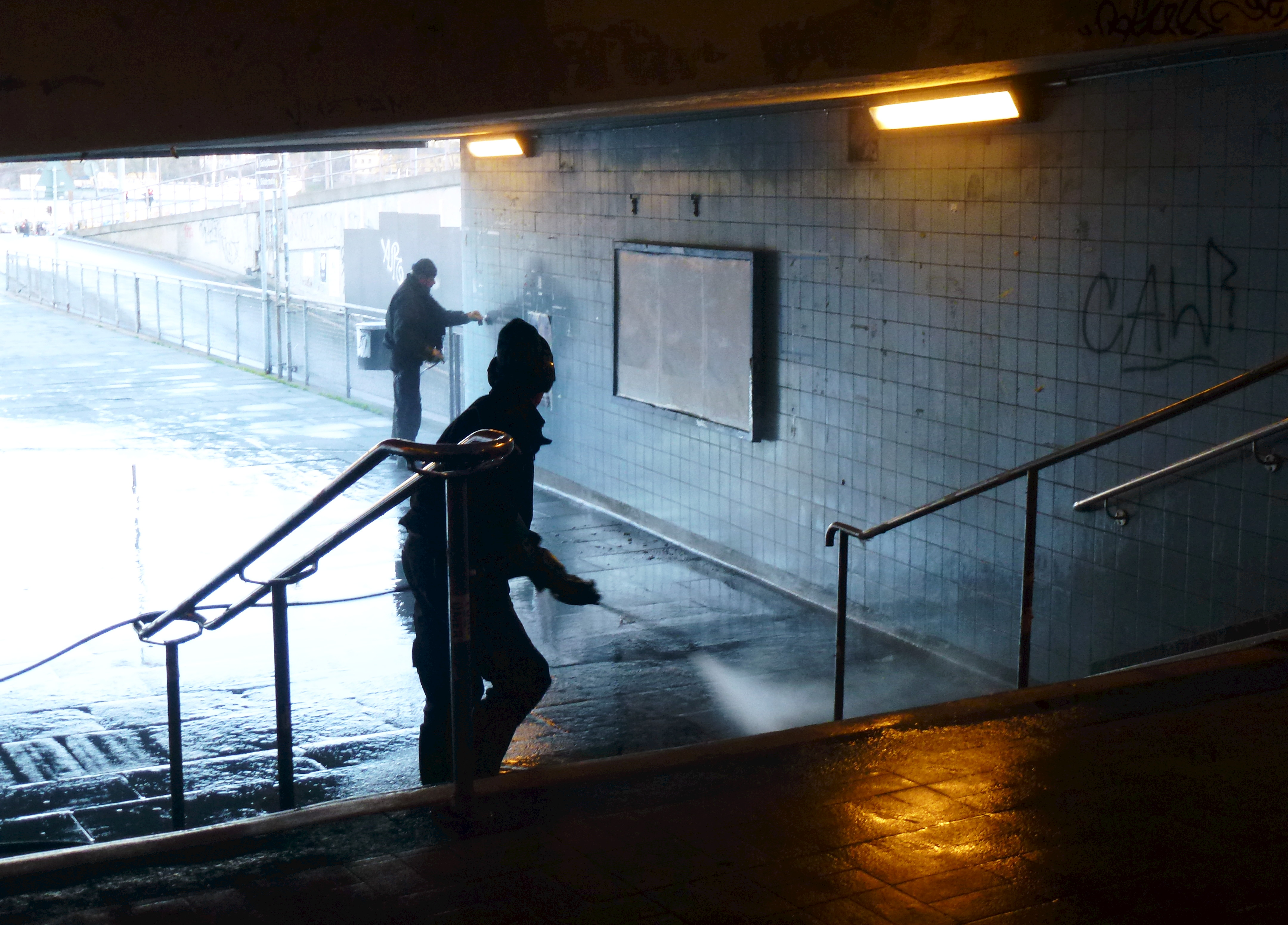 Klottersanering i Blå Bodarna